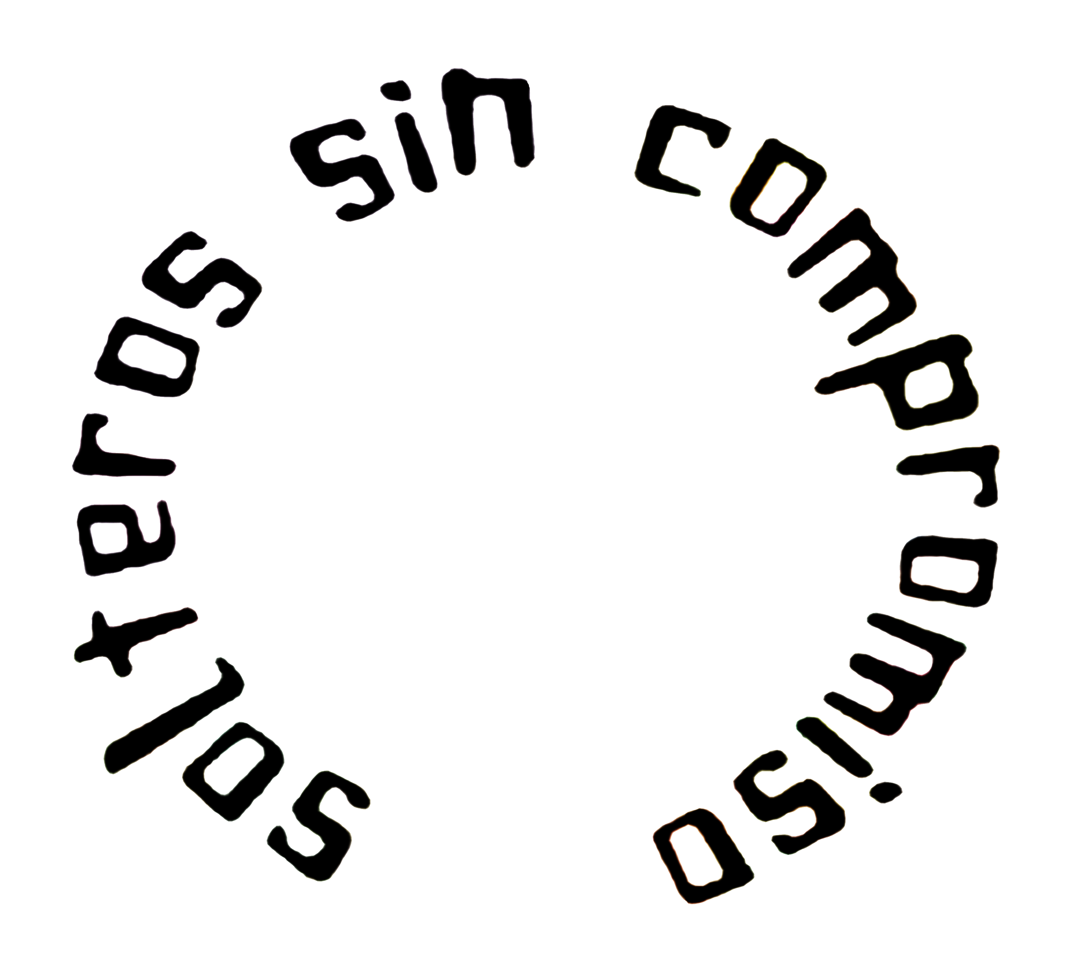 Logotipo de Solteros sin compromiso, con un archivo png con texto básico. Este logotipo fue usado en las temporadas emitidas por televisión.